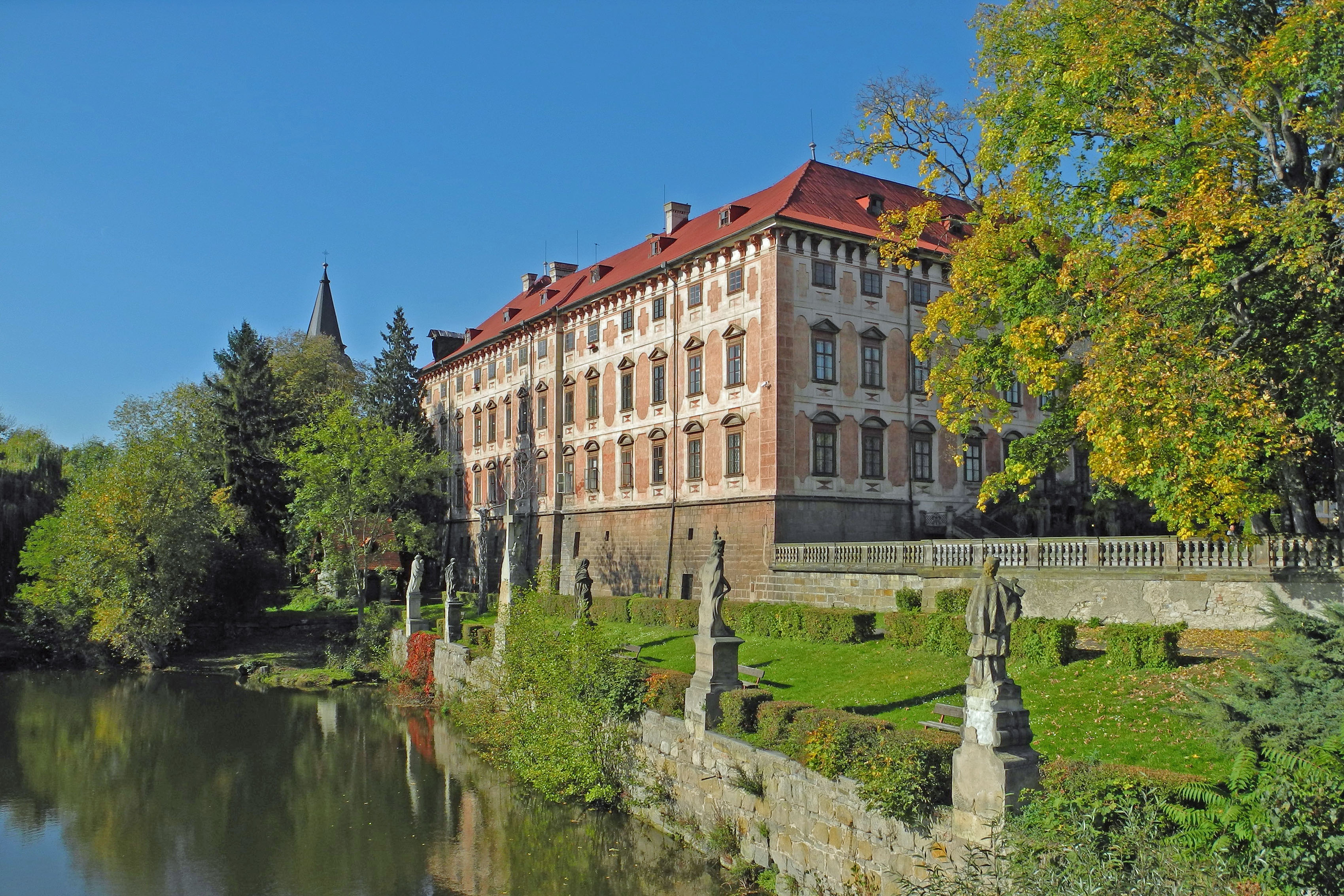 Blick von der Egerbrücke zum Schloss Libochowitz (Libochovice), Gartenseite mit Uferstatuen